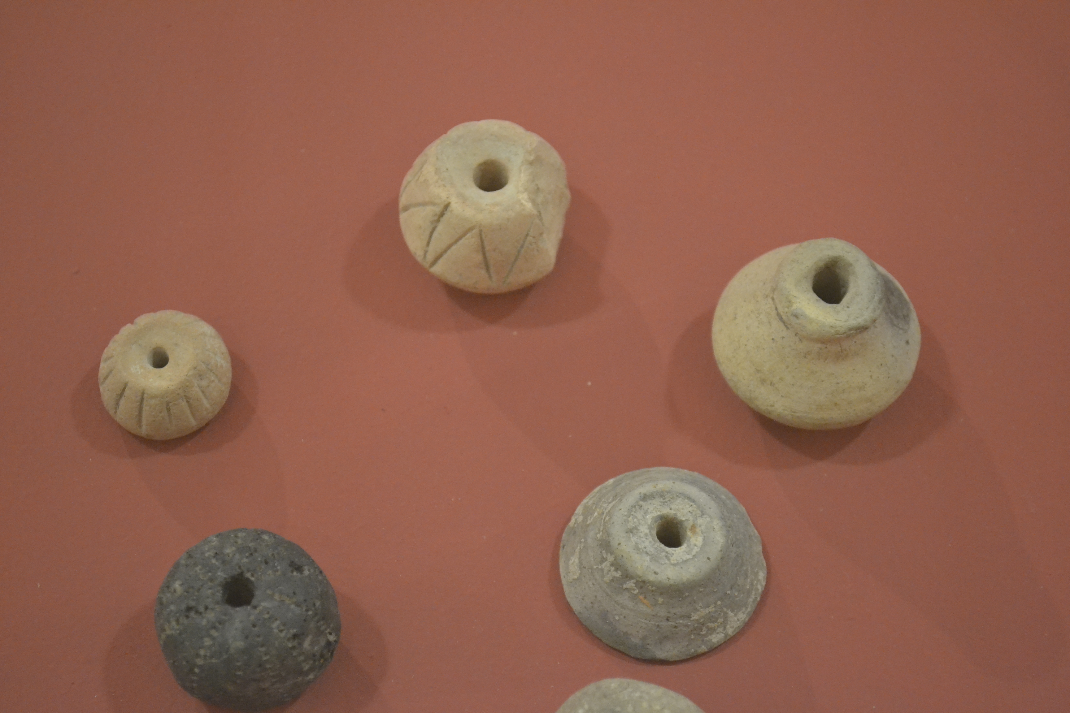 Fusayolas de telar. La Bastida de les Alcusses. Museo Arqueológico de Mogente.